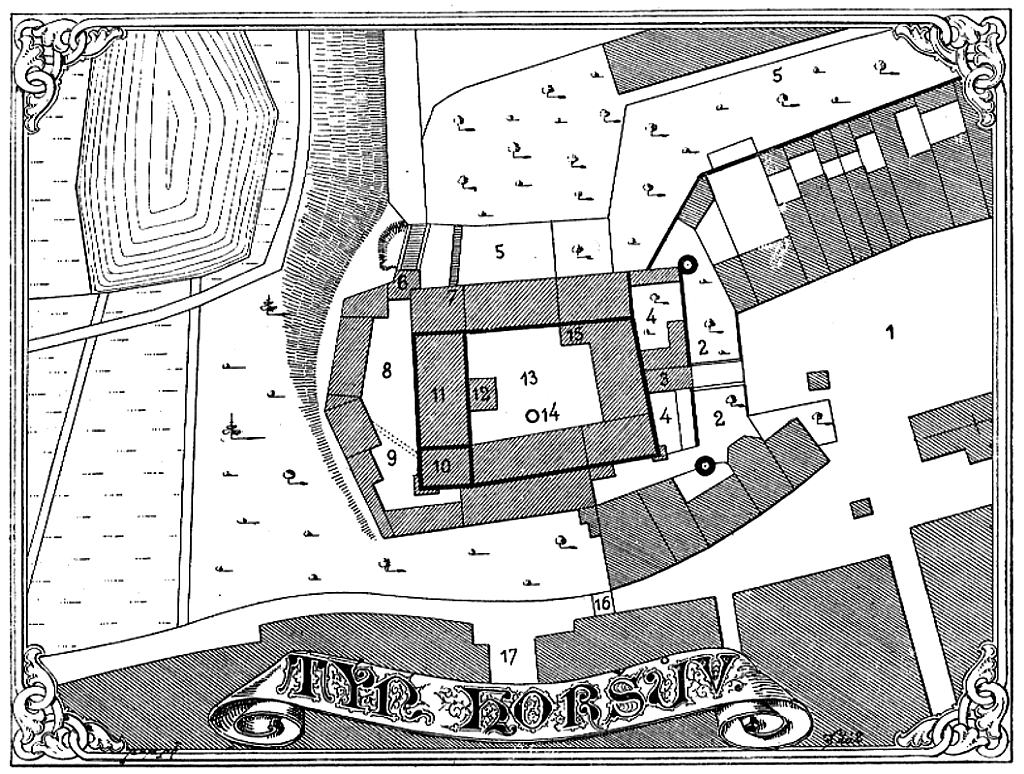 Horšovský Týn – půdorys hradu a přilehlé části města (1 – náměstí, 2 – příkop, 3 – východní brána, 4 – parkán, 5 – příkop, 6 – severní brána, 7 – branka, 8 – dvůr, 9 – bývalý dřevěný můstek, 10 – věž, 11 – starý biskupský palác, 12 – vchod do sklepů, 13 – nádvoří, 14 – studna, 15 – místnost s malovanými erby, 16 – bývalá brána, 17 – Svatojanská ulice